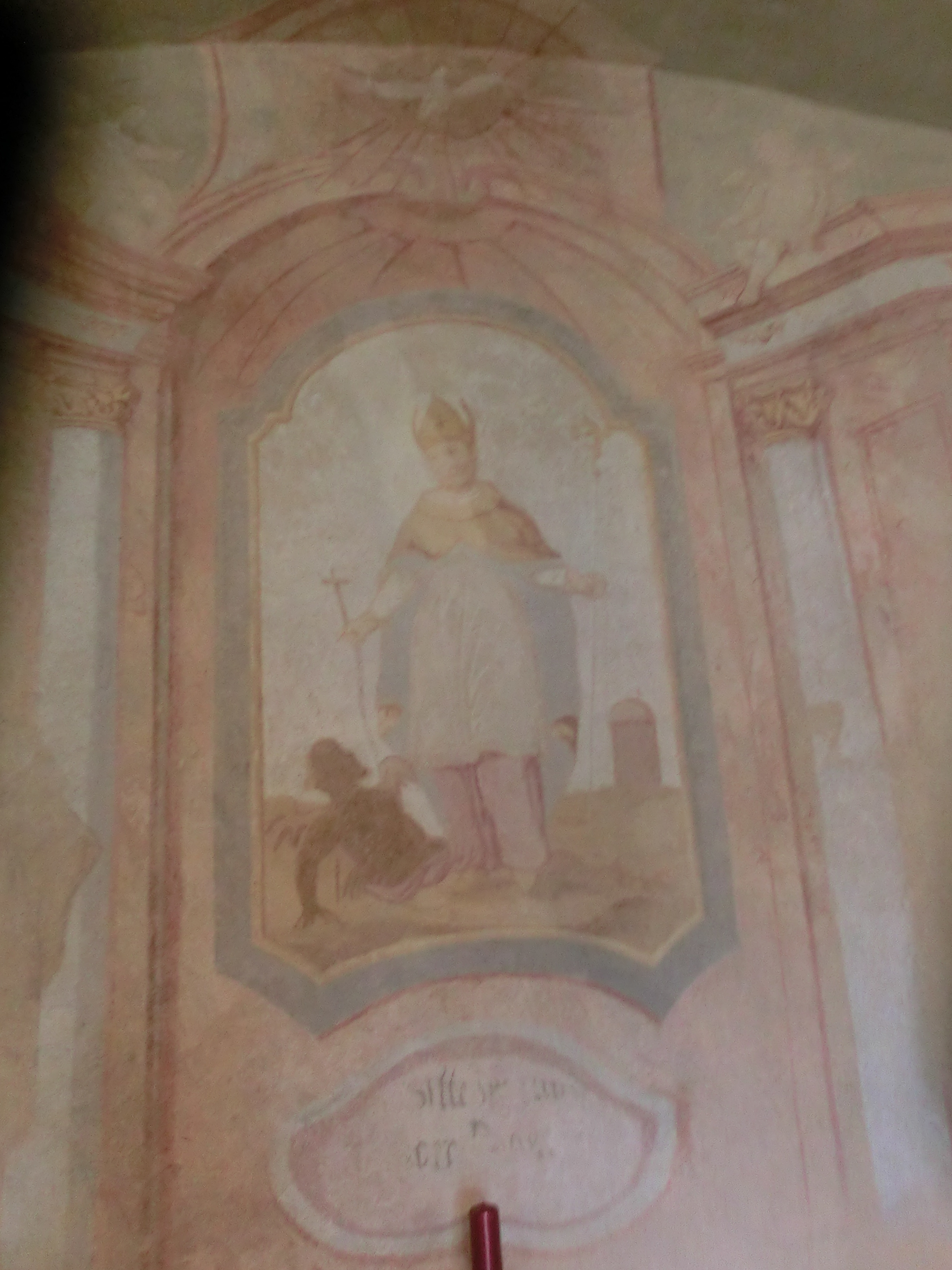 Freska sv. Prokopa ve stejnojmenné kapli v Chotiněvsi